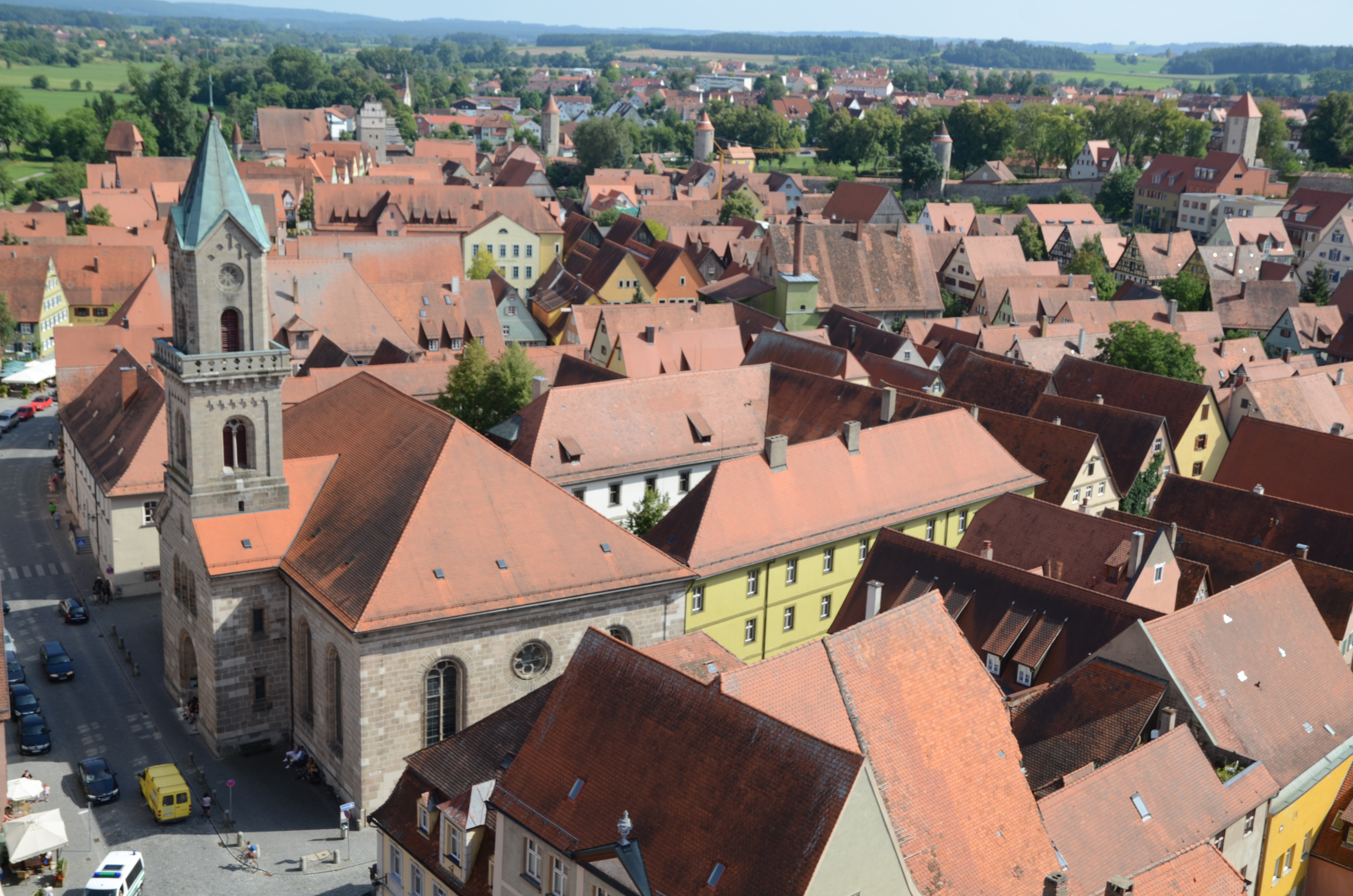 Baudenkmal in Dinkelsbühl: Adresse siehe Dateiname